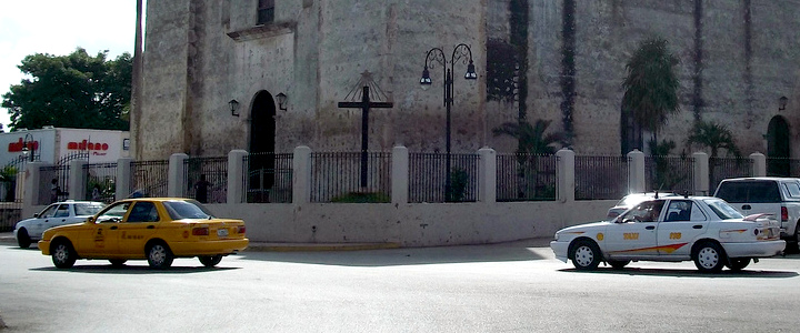 Taxi en Tizimín